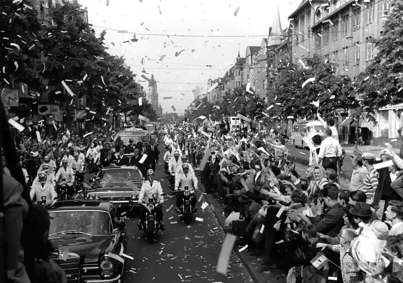 Besuch des US-Präsidenten John F. Kennedy in Berlin Information added by Wikimedia users.